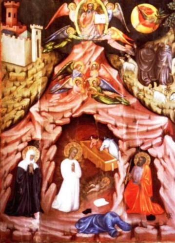 Immagine tratta da